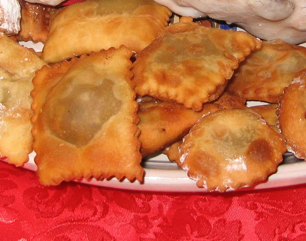 Dolci aviglianesi: tarallo e calzoncelli